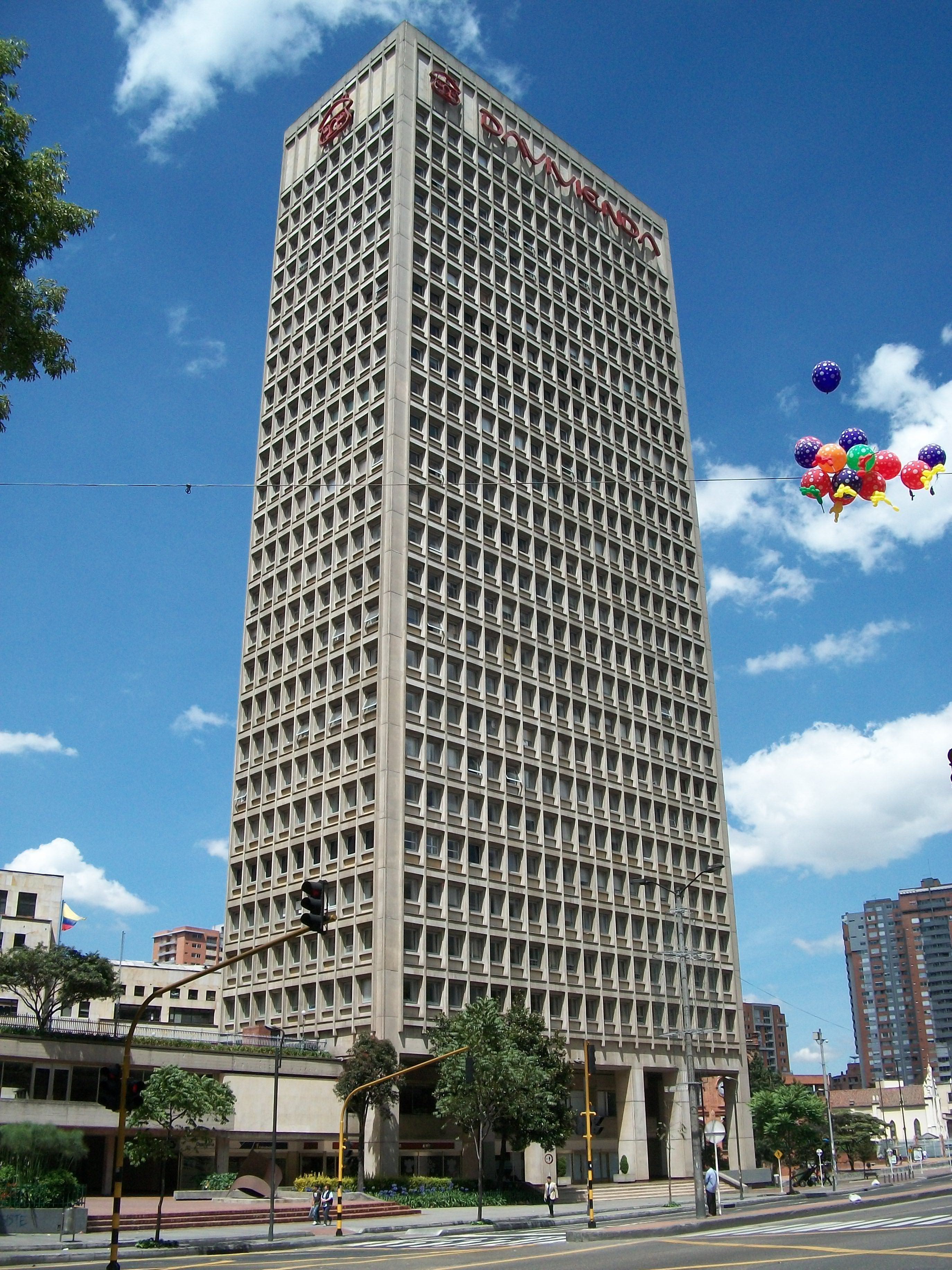 Torre Bavaria (ahora Davivienda) desde la Séptima con calle Ventiocho.